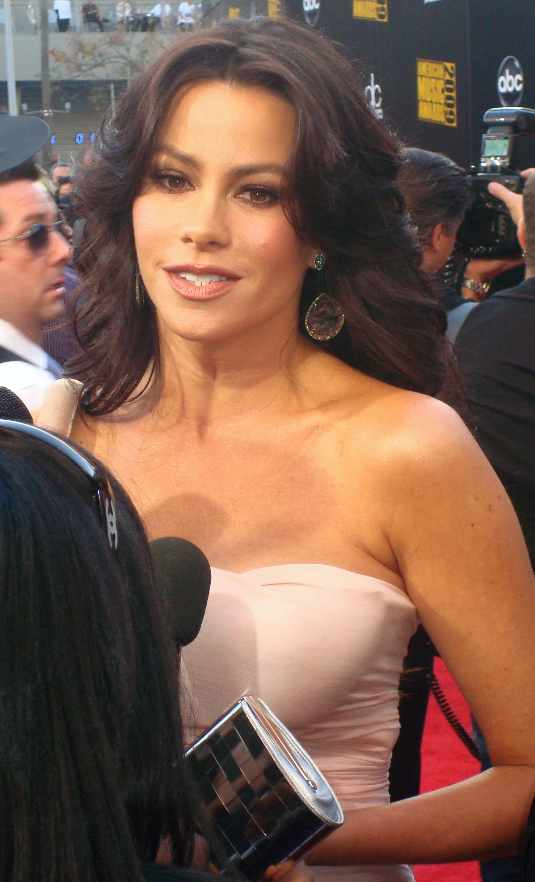 Sofia Vergara